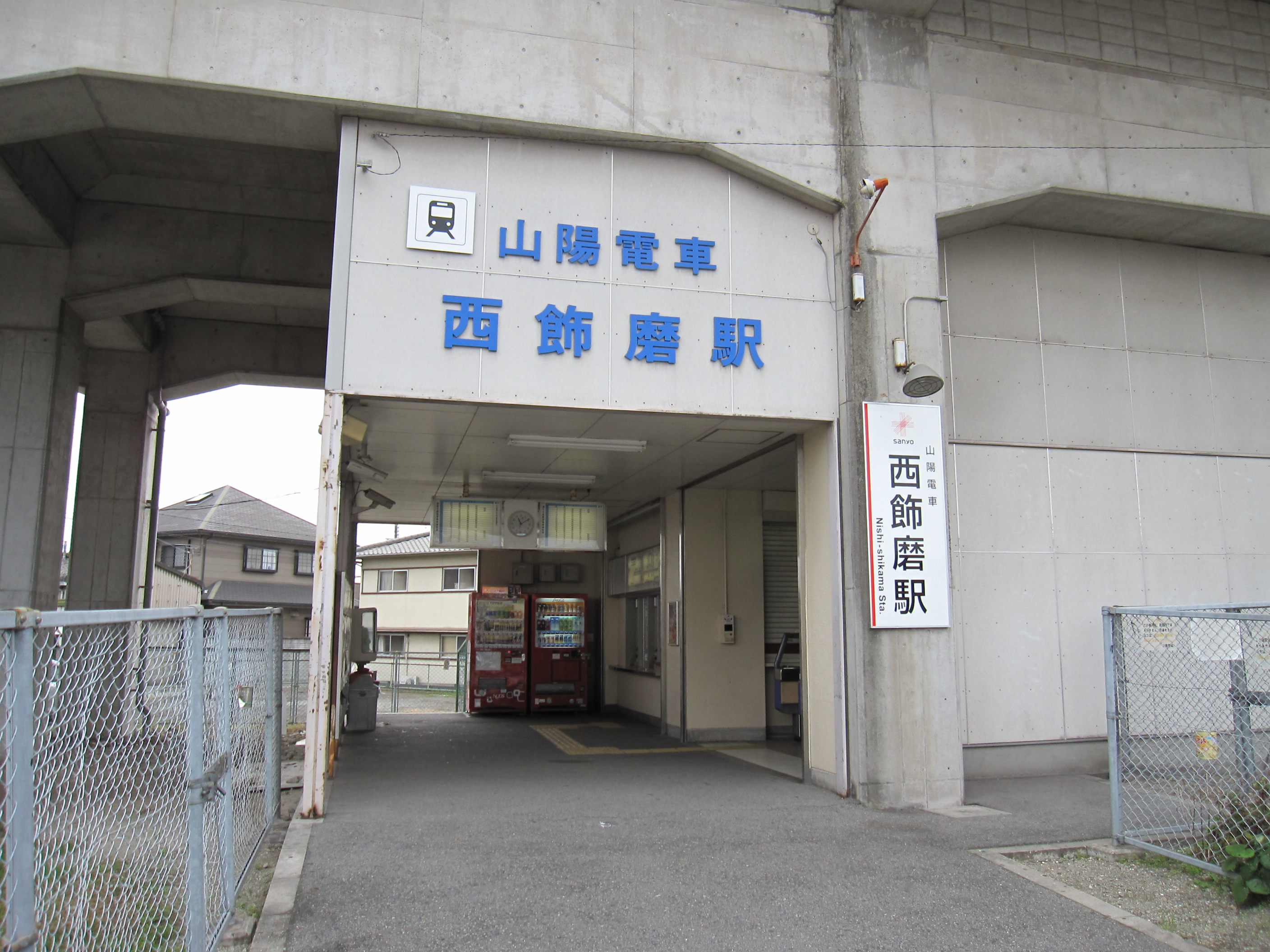 山陽電鉄西飾磨駅